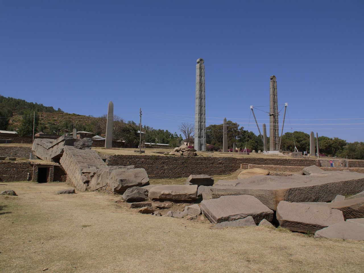 Ezana stele (obelisk) in Aksum, een symbool van beschaving Aksum, Ethiopia